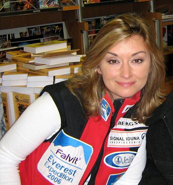 Martyna Wojciechowska (ur. 28 września 1974 w Warszawie) - polska prezenterka telewizyjna, dziennikarka, podróżniczka i pisarka.